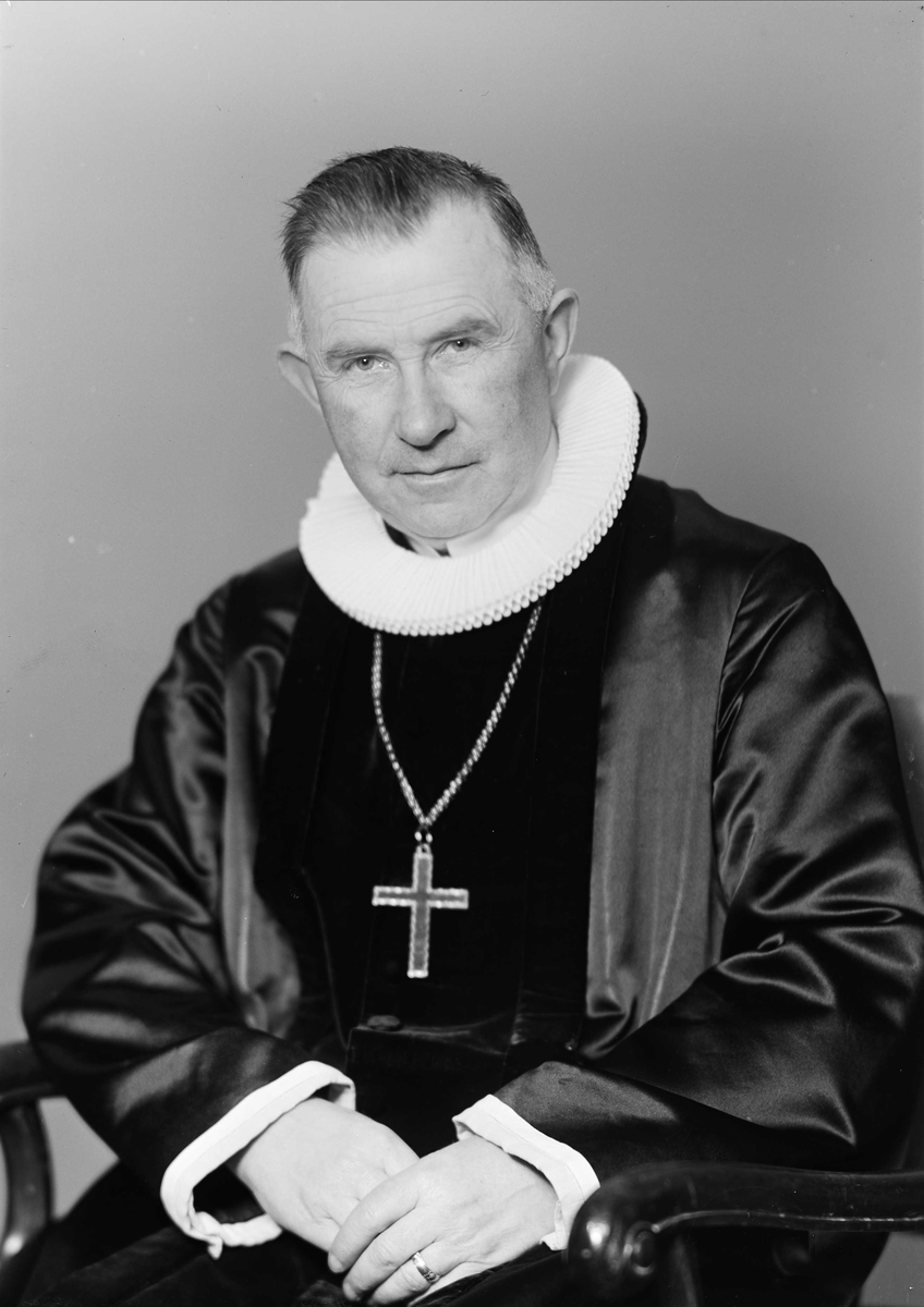 Eivind Berggrav (1884–1959), biskop i Hålogaland bispedømme fra 1928 til 1937, deretter i Oslo bispedømme fra 1937 til 1951.